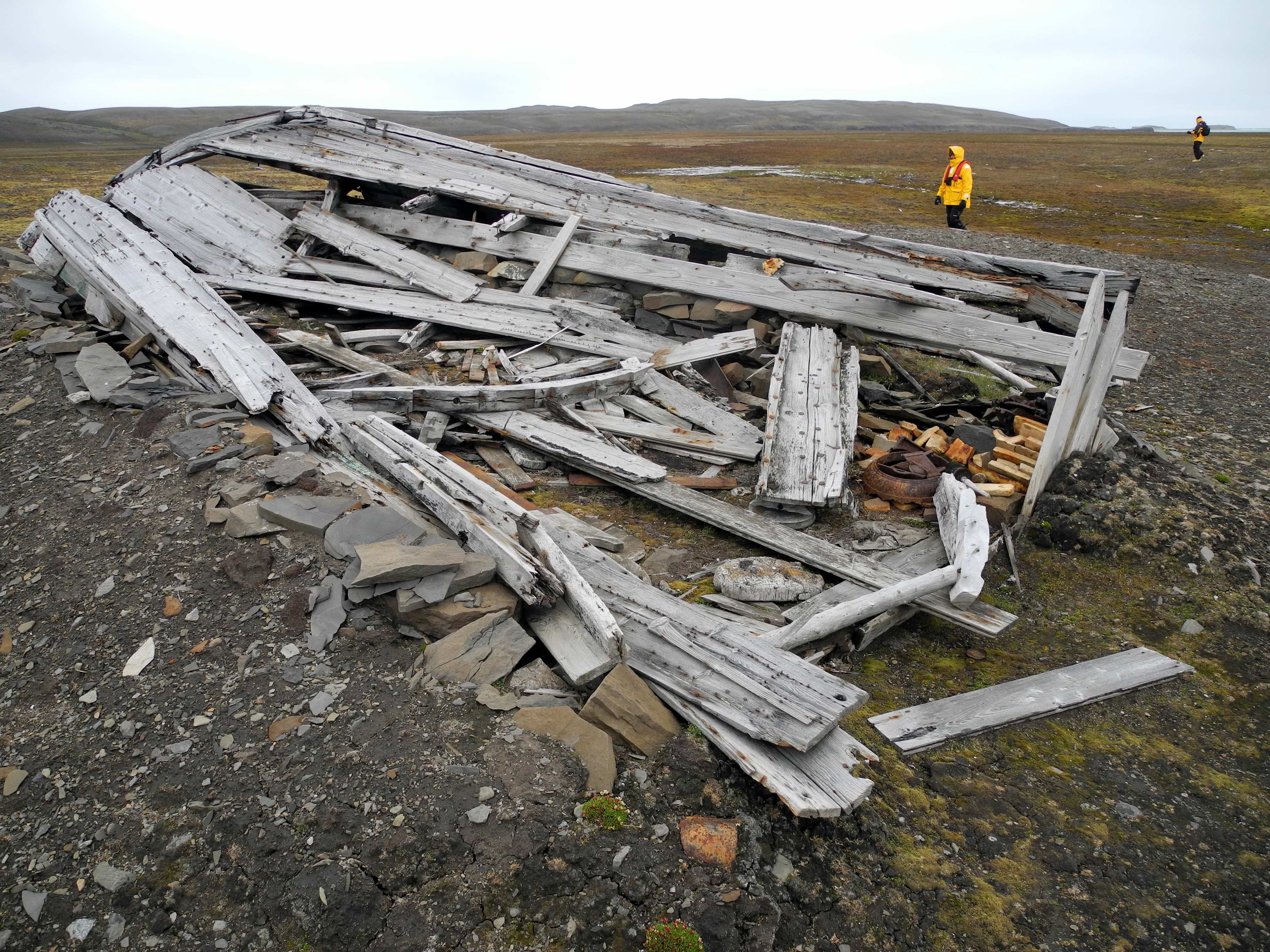 Kjeftausa, an overturned boat used for shelter and storage at Ingebrigtsenbukta.